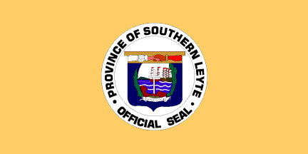 Dit materiaal is afkomstig van of en is door de auteur Jaume Ollé als GFDL beschikbaar gesteld, zie de toestemmingsemail. Hiermee vervallen de strictere voorwaarden in de disclaimers op de genoemde sites.Vrijgegeven bijdrage op Flags of the World van Jaume Olle. Zie deze verklaring op de Spaanstalige Wikipedia. GNU FDL